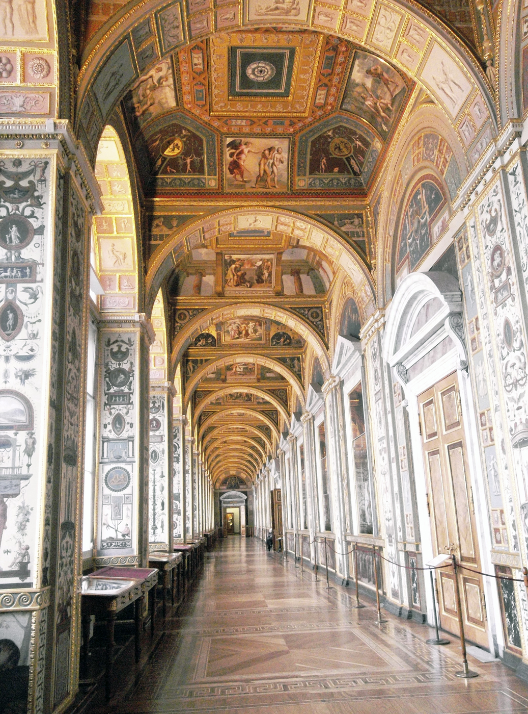 Лоджии Рафаэля в здании Большого Эрмитажа